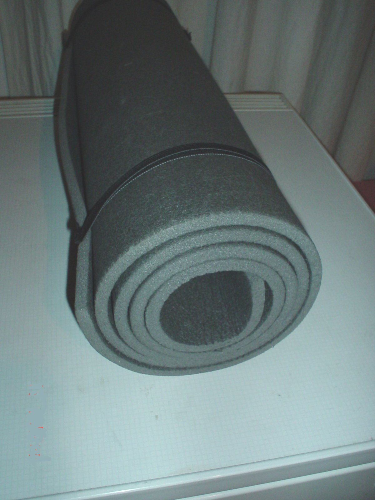 Mattress